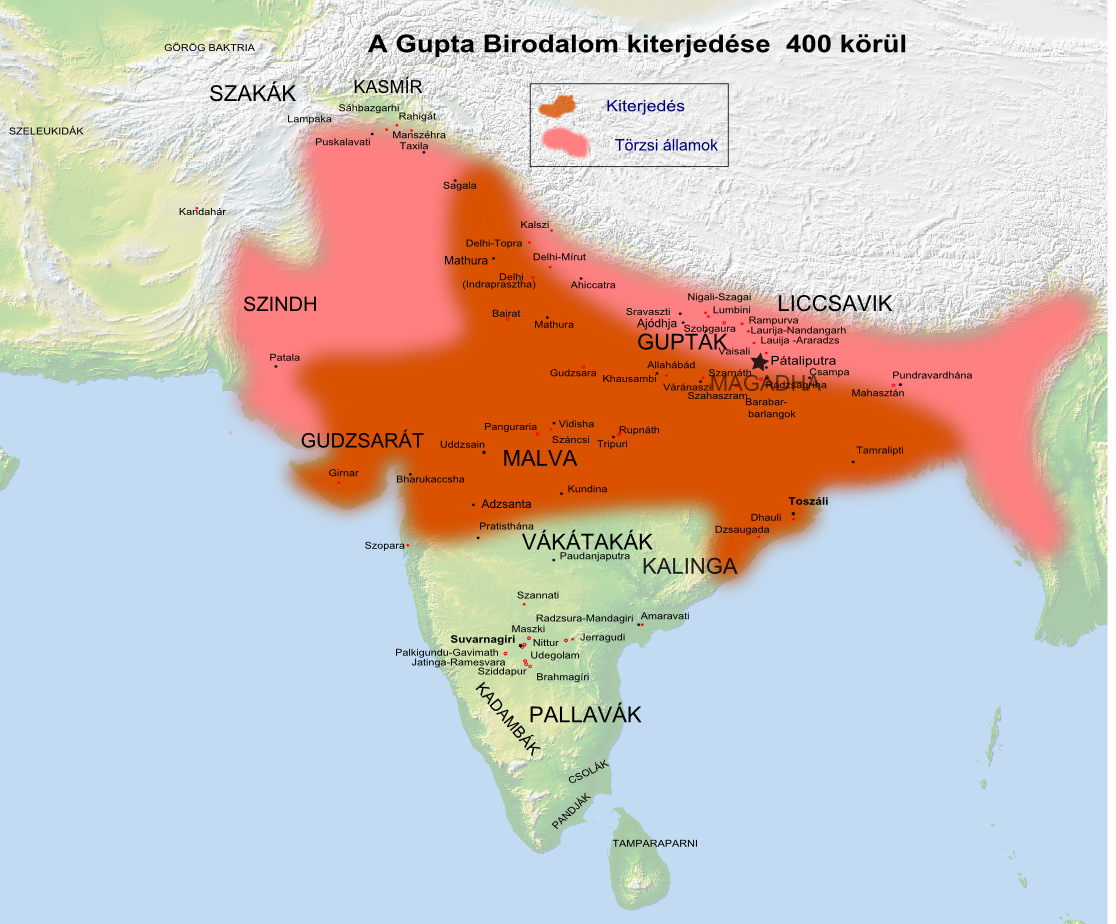 A Gupta Birodalom kiterjedése 400 körül